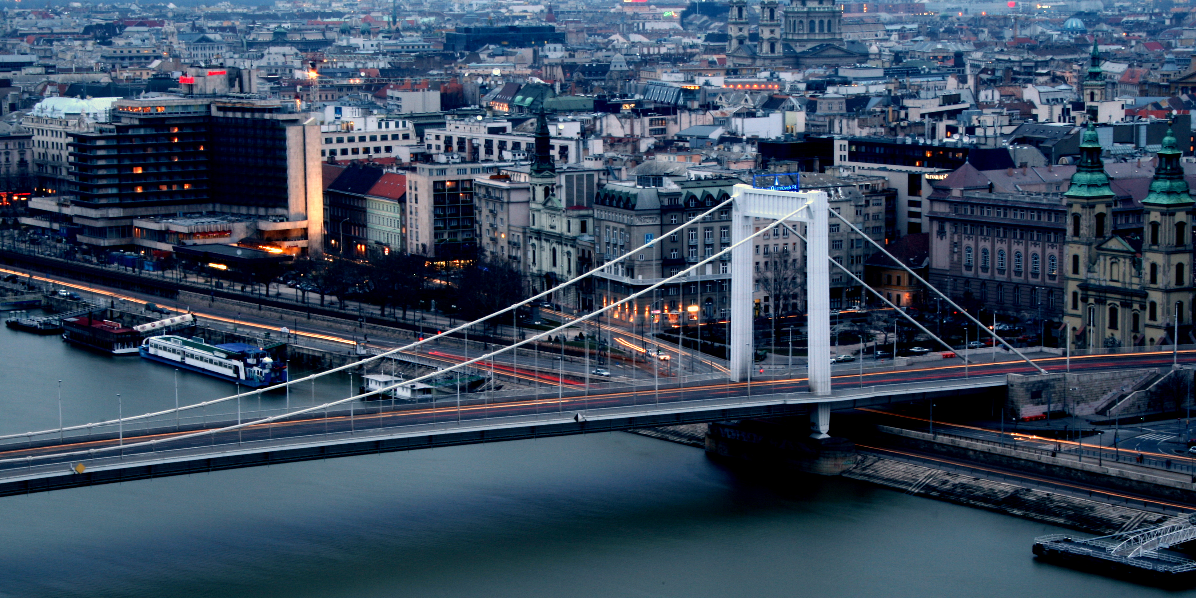 Erzsébet híd